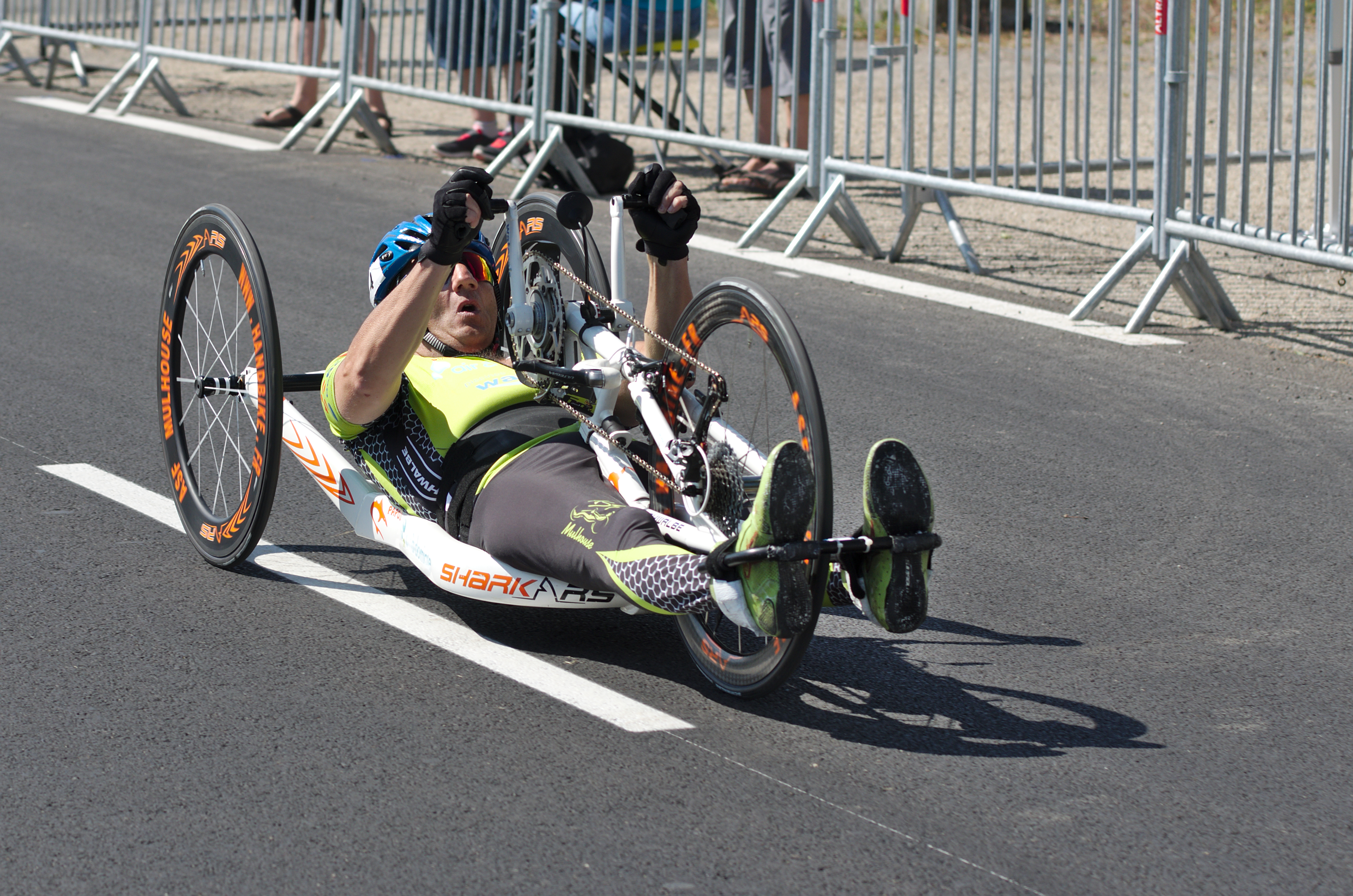 Championnat de France de cyclisme handisport - 20140615 - Contre la montre